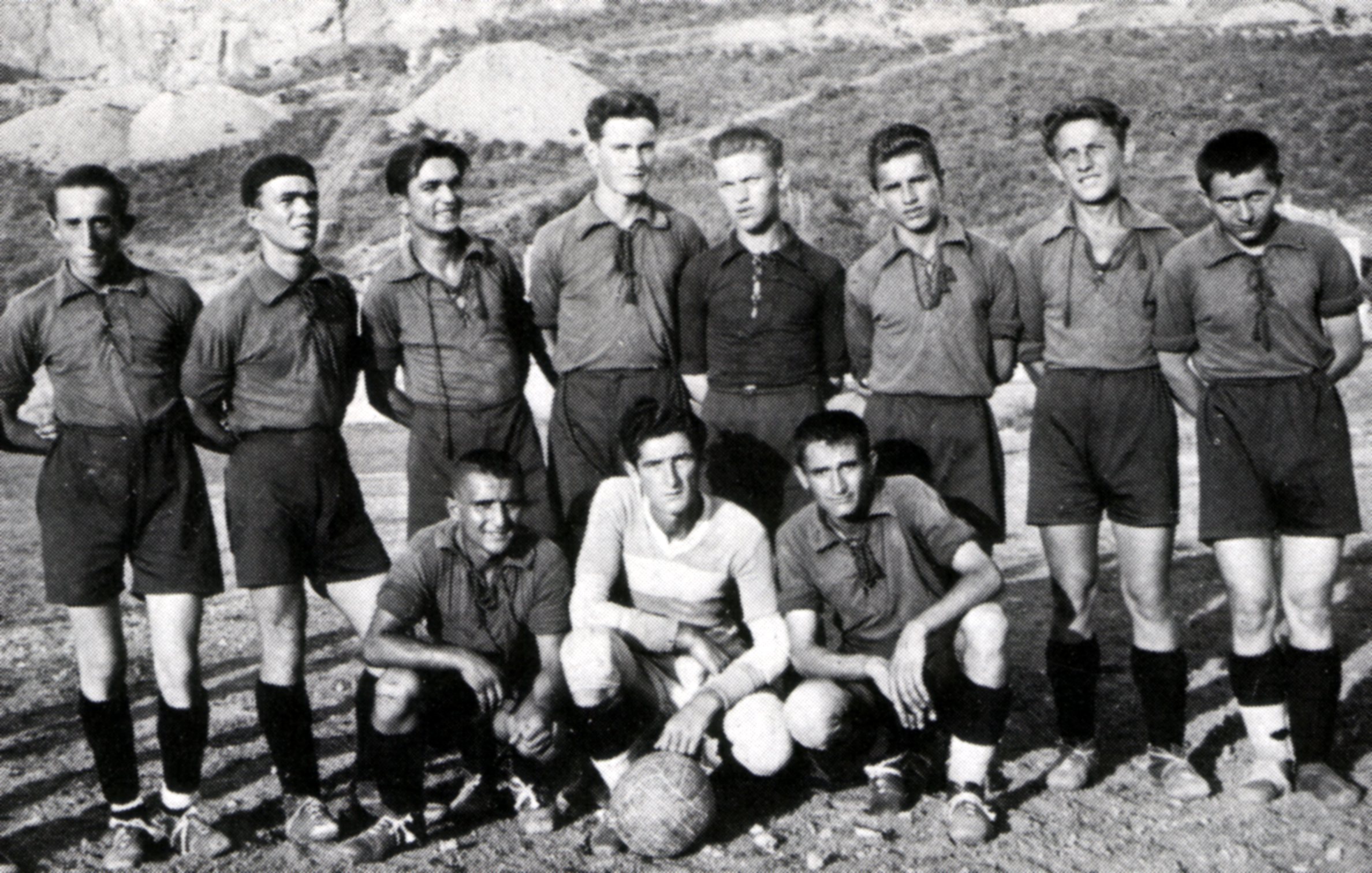 Српски (ћирилица): Екипа из 1939. године. Стоје: Петар Перић - Фросика, Љубиша Димитријевић, Божа Манчић, Љубомир Цветковић, Кристафил Наумовић - Кица, Раја Матејић, Љубисав Петровић - Шљивка и Влада Филиповић - Пекар. Чуче: Тодор Ђорђевић, Никола Младеновић и Душан Милосављевић.